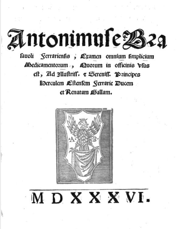 Antonius Musa Brasavolus, Examen_omnium_simplicium (1536) title page